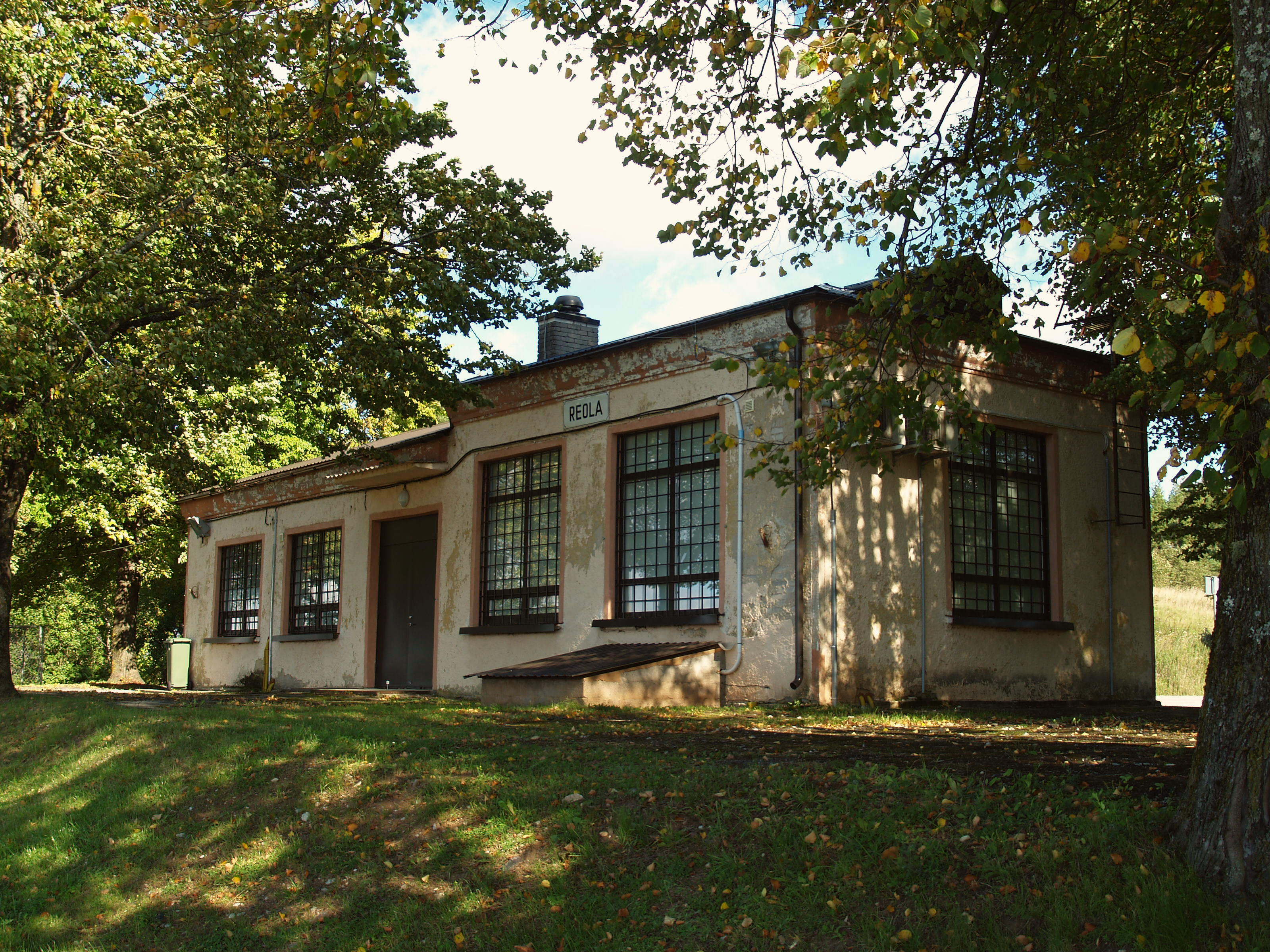 Reola jaamahoone